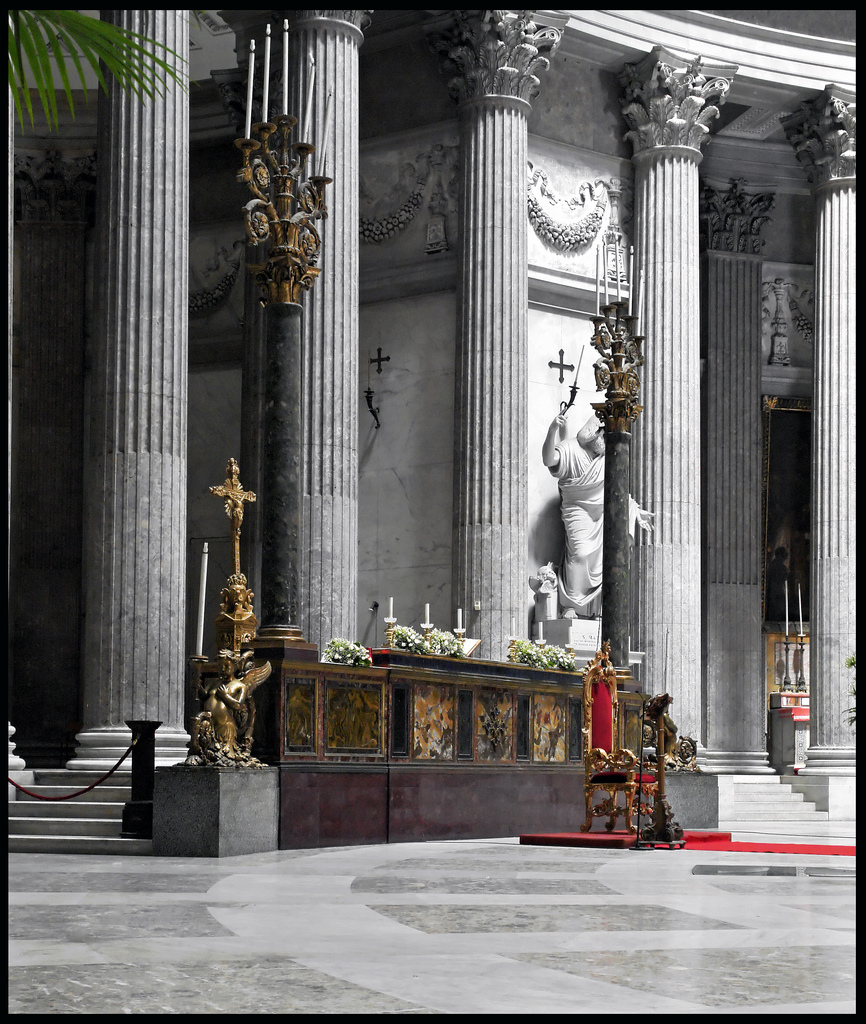 Basilica di San Francesco di Paola